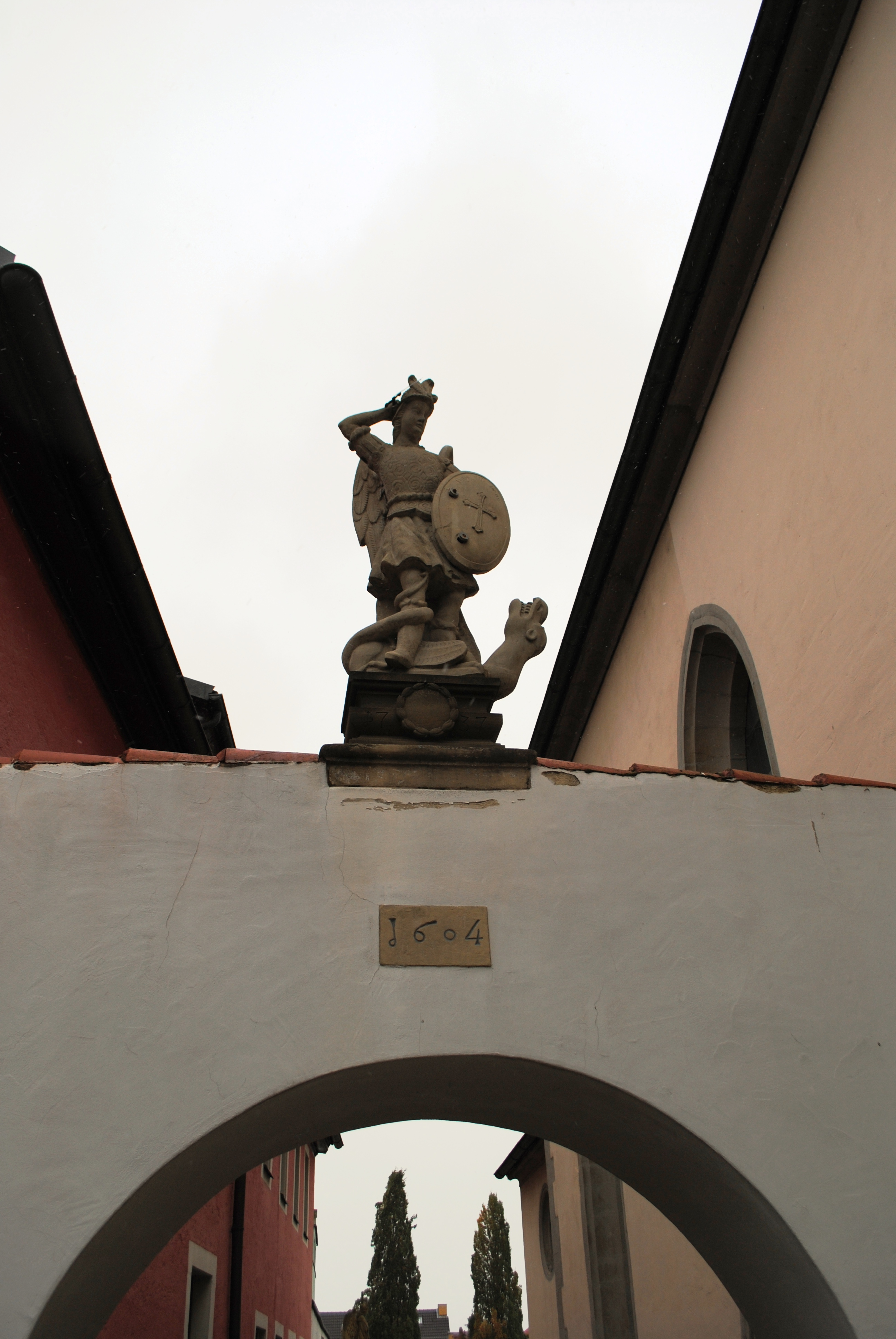 Heiliger Florian, auf Friedhofsportal am Oberen Markt, Volkach, Friedhof, im 16. Jahrhundert angelegt, bez. 1604; auf der Tormauer hl. Florian, bez. 1737; D-6-75-174-84